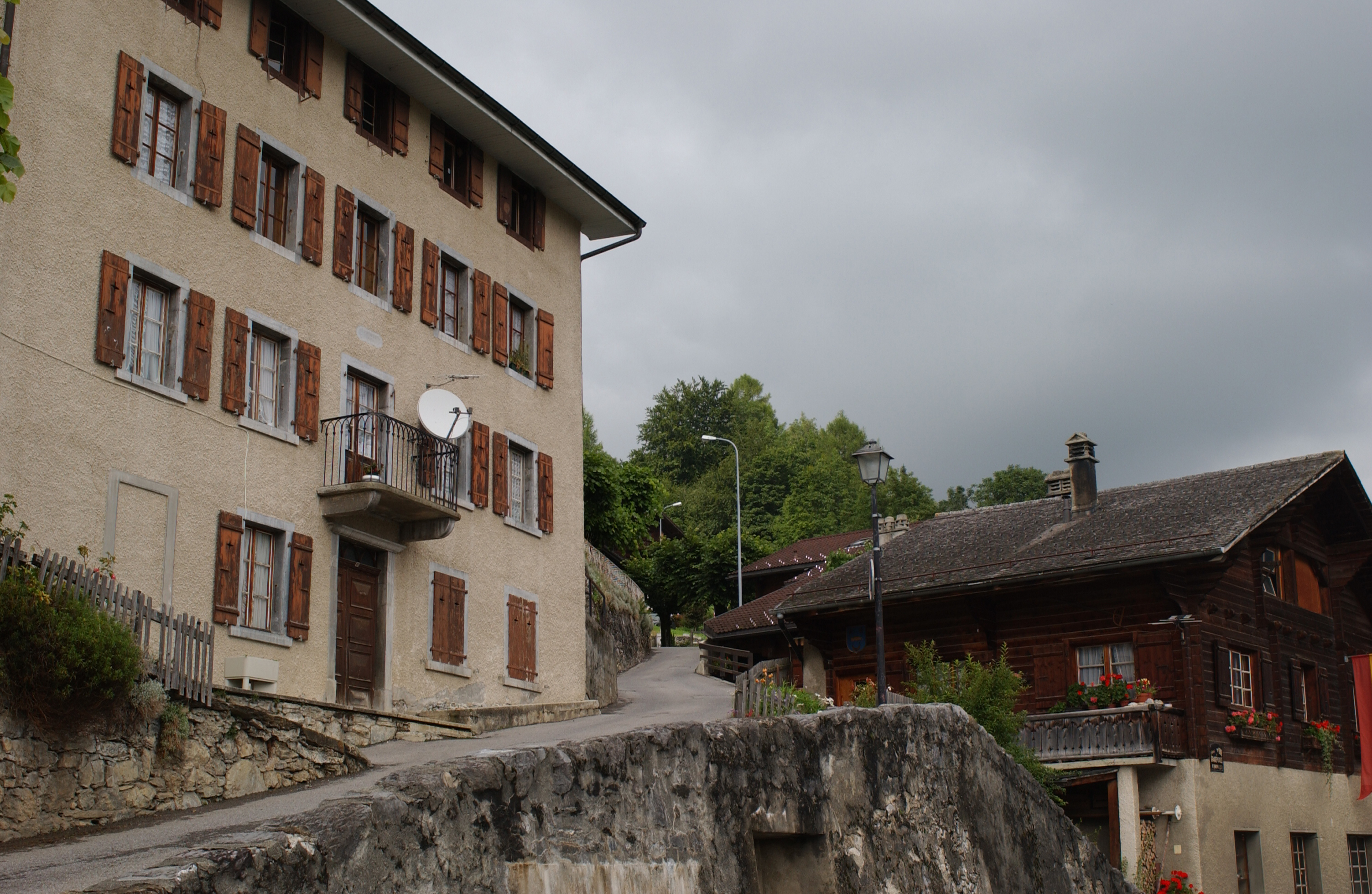 Vue de Gryon (Vaud).